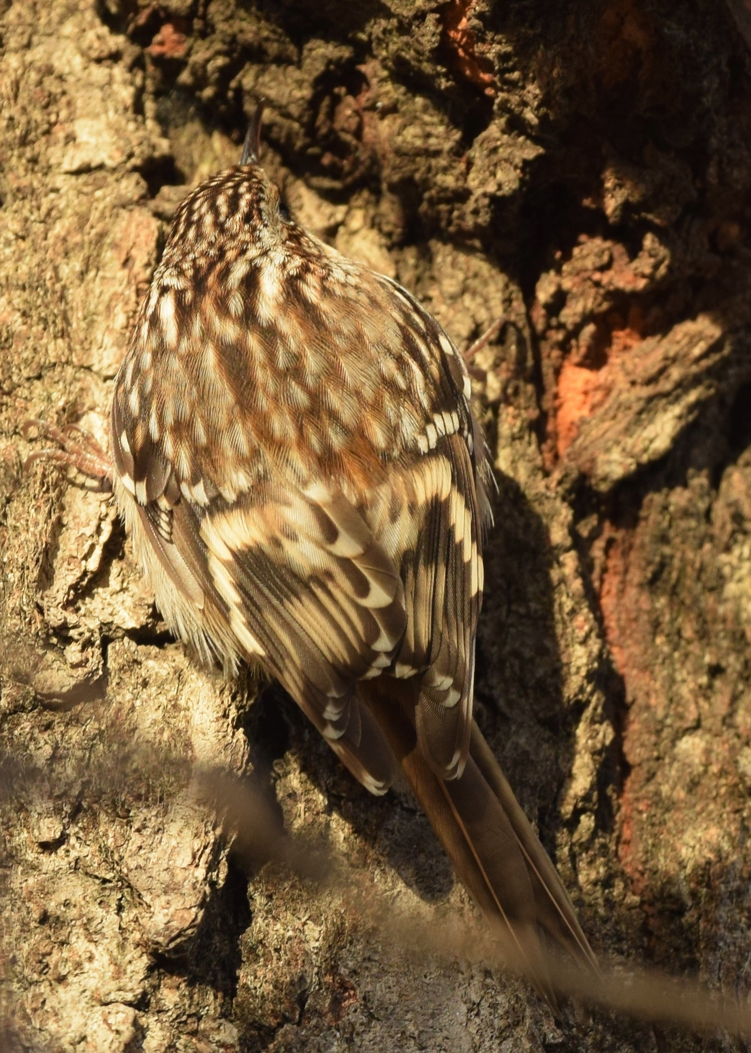 Carondelet Park 1/24/16